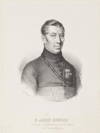 Аббат Кудер, кюре католической римской церкви Святого Луи в Москве, гравюра